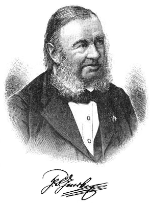 Johann Friedrich Jencke (1812–1893), Porträtzeichnung